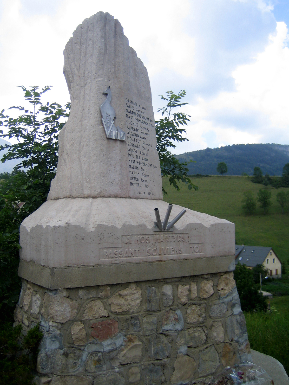 Gresse-en-Vercors (Isère, France) - Monument en hommage aux combattants du maquis tués en juillet 1944. Gresse-en-Vercors possède 2 monuments de ce type. Il s'agit ici de celui érigé dans le village, non loin de l'église et de la mairie. .